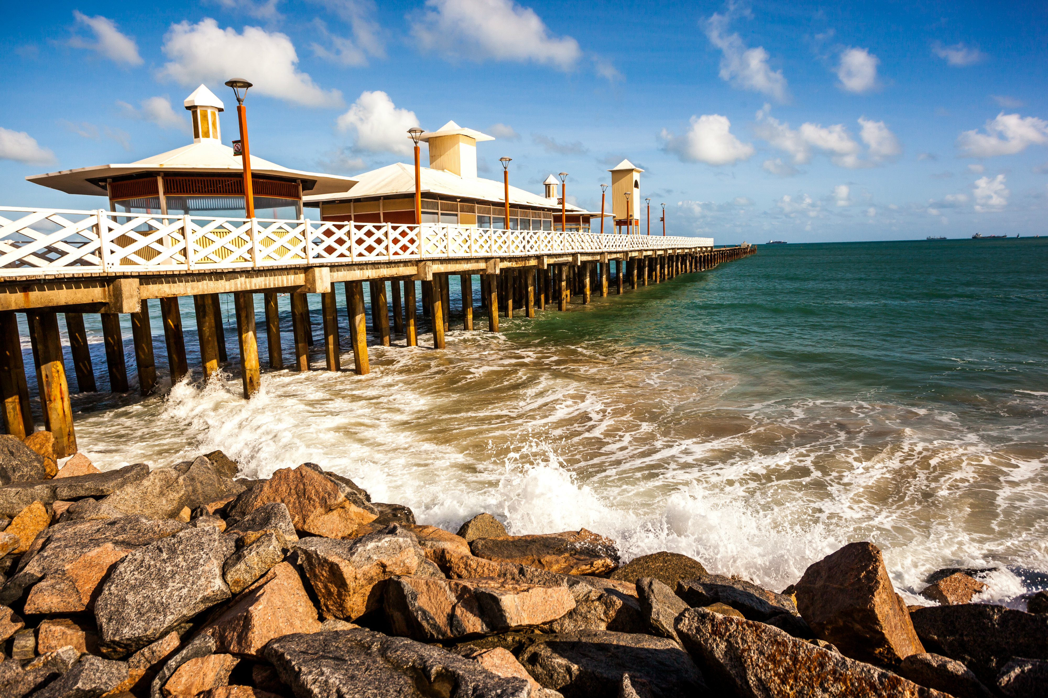 Ponte dos Ingleses/Ponte Metálica